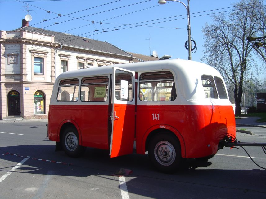 Historický autobusový přívěs Karosa B 40, Náměstí Republiky, Moravská Ostrava